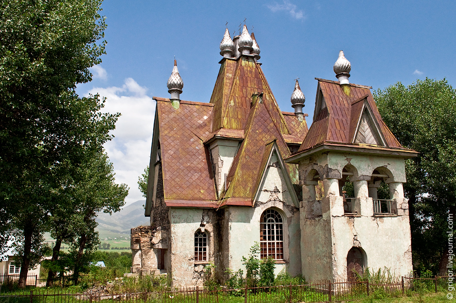 Церковь Святого Николая Чудотворца в селе Амракиц (бывш. Киров)